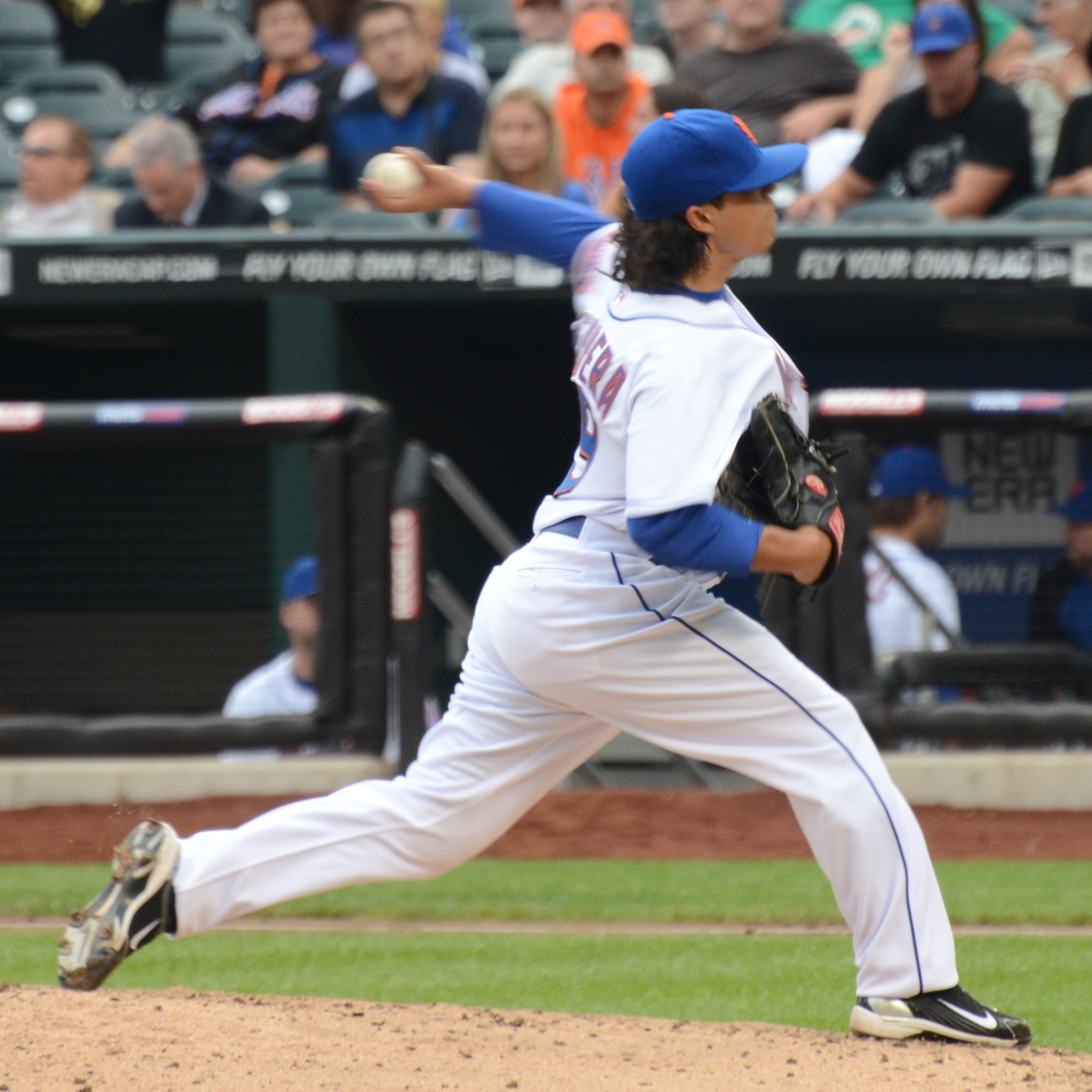 Daniel Herrera